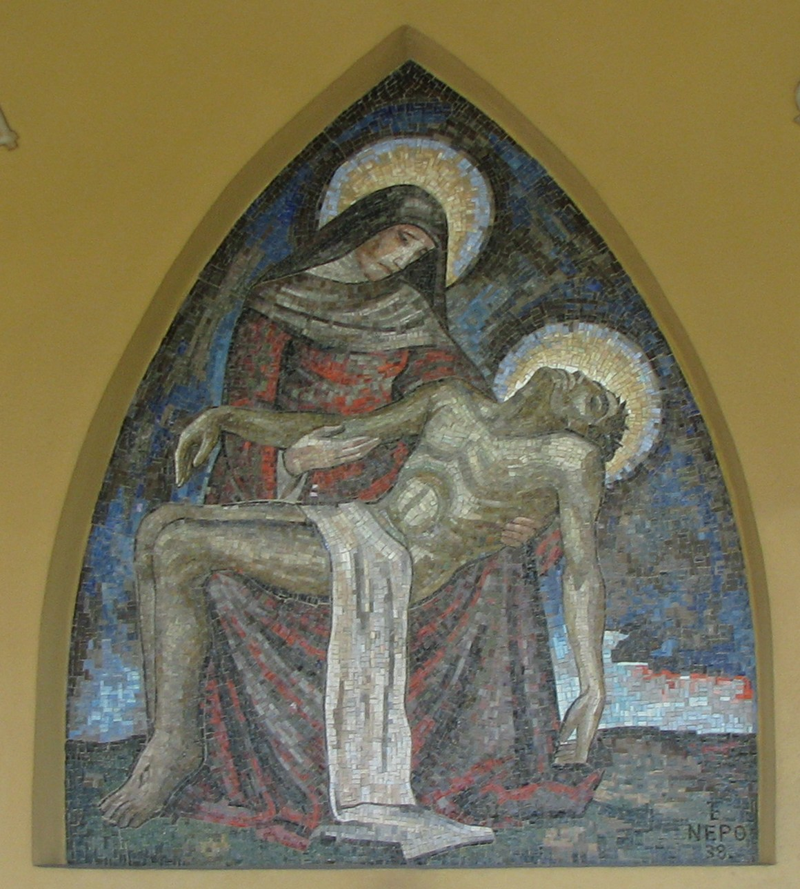 Westfriedhof Innsbruck, Mosaik Pietà von Ernst Nepo, 1938